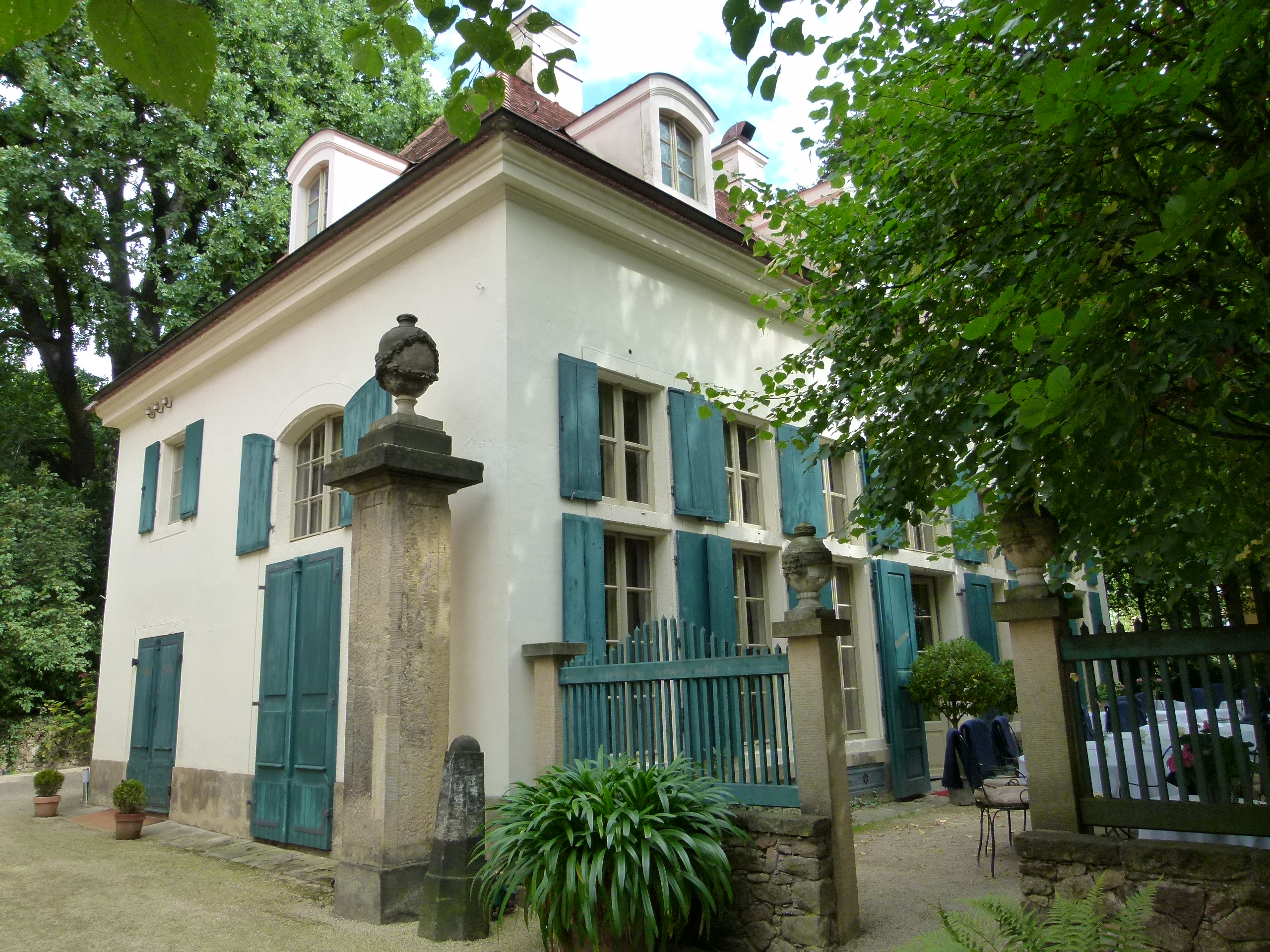 Nebengebäude, Denkmalgeschütztes Gebäude, Augustusweg 48, Radebeul, Sachsen